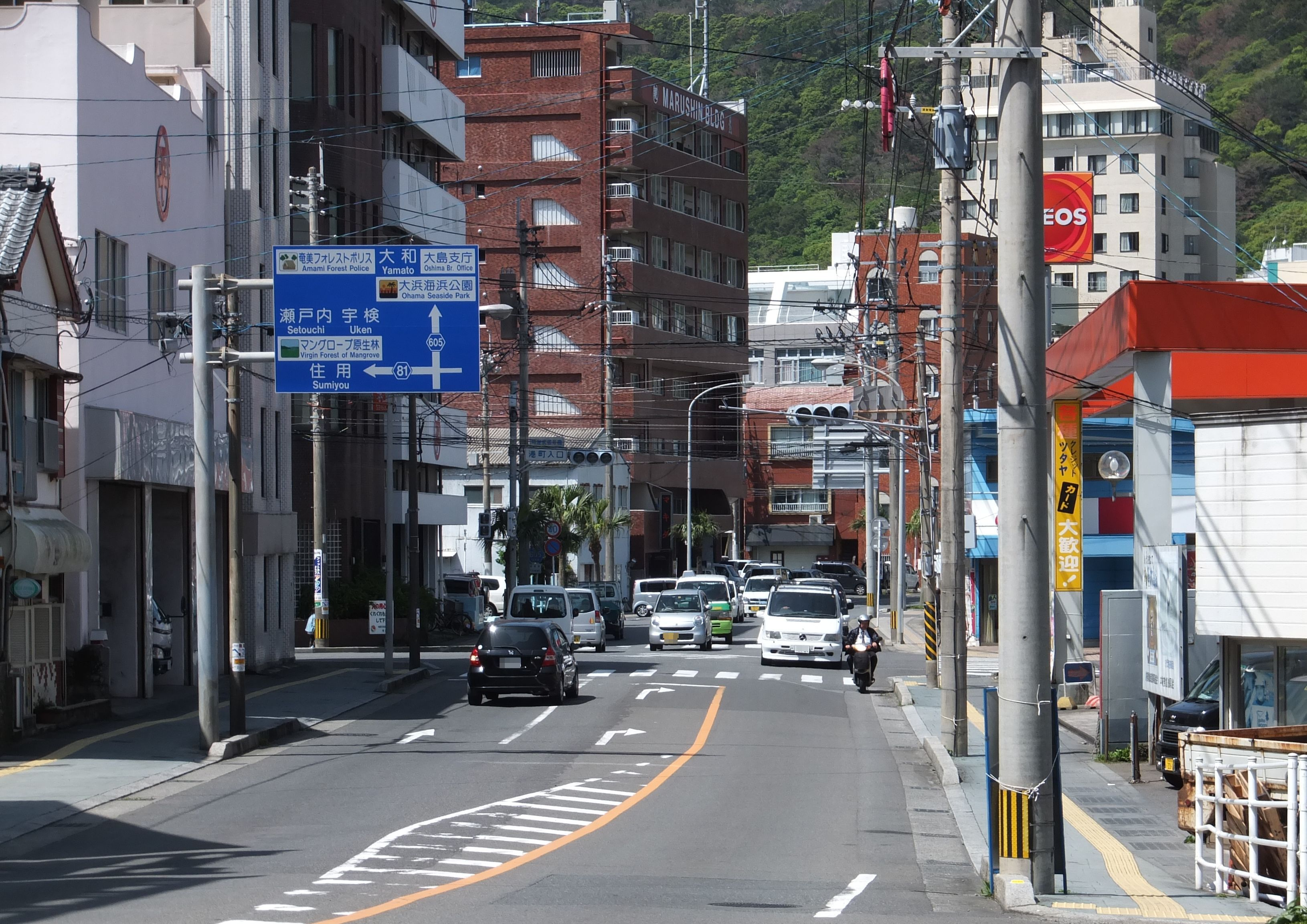 奄美市中心部